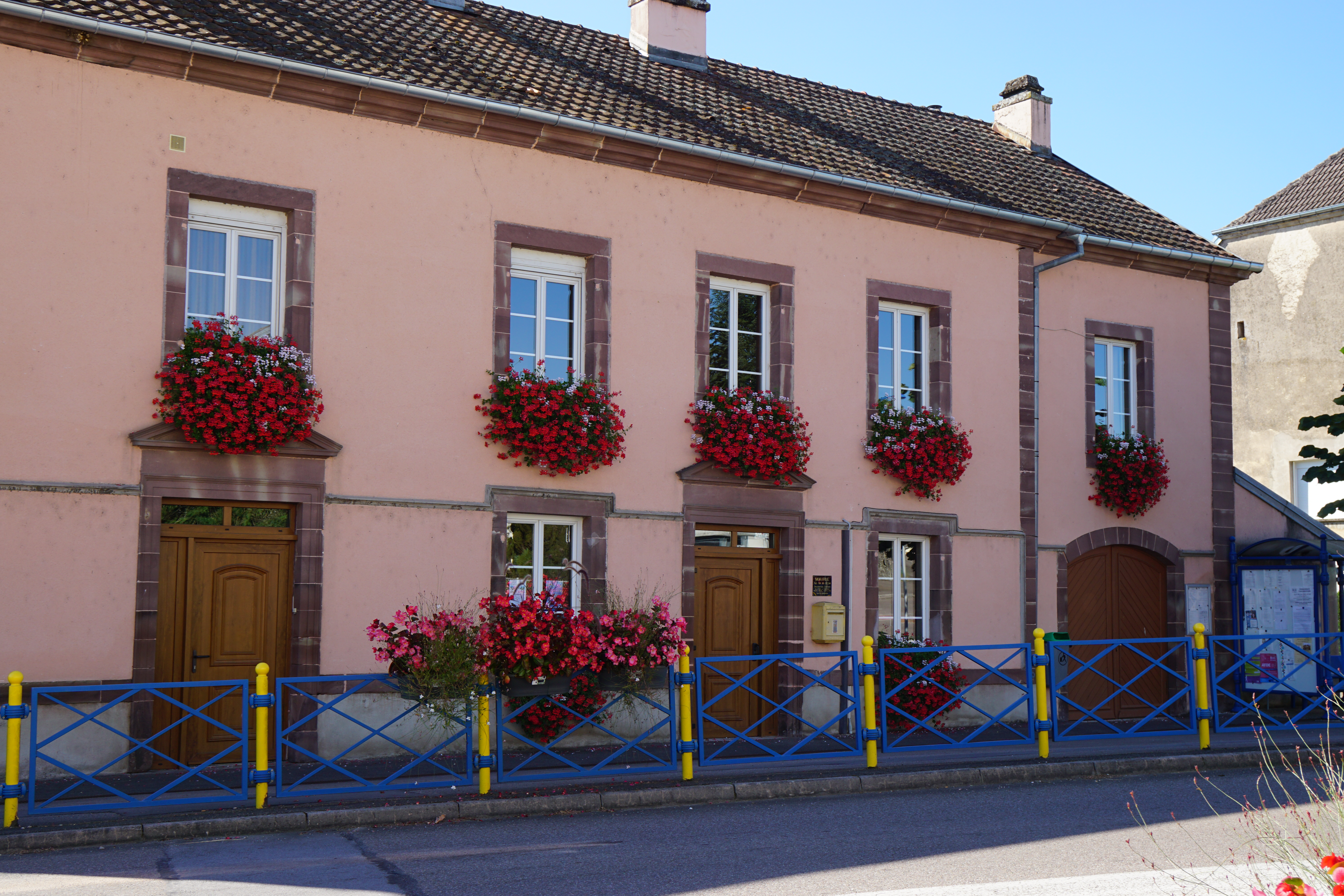 La mairie de Magnoncourt.